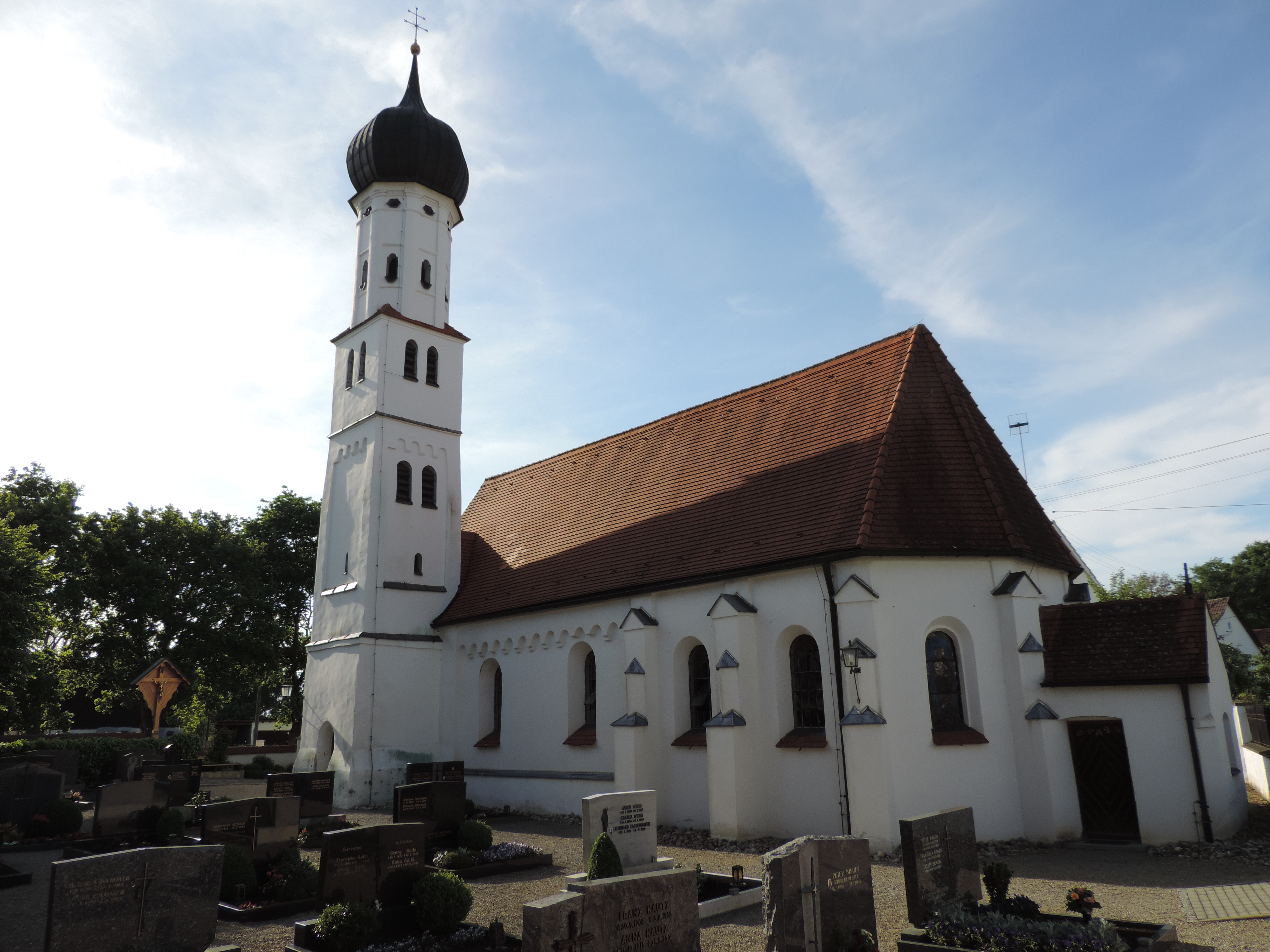 Südostansicht